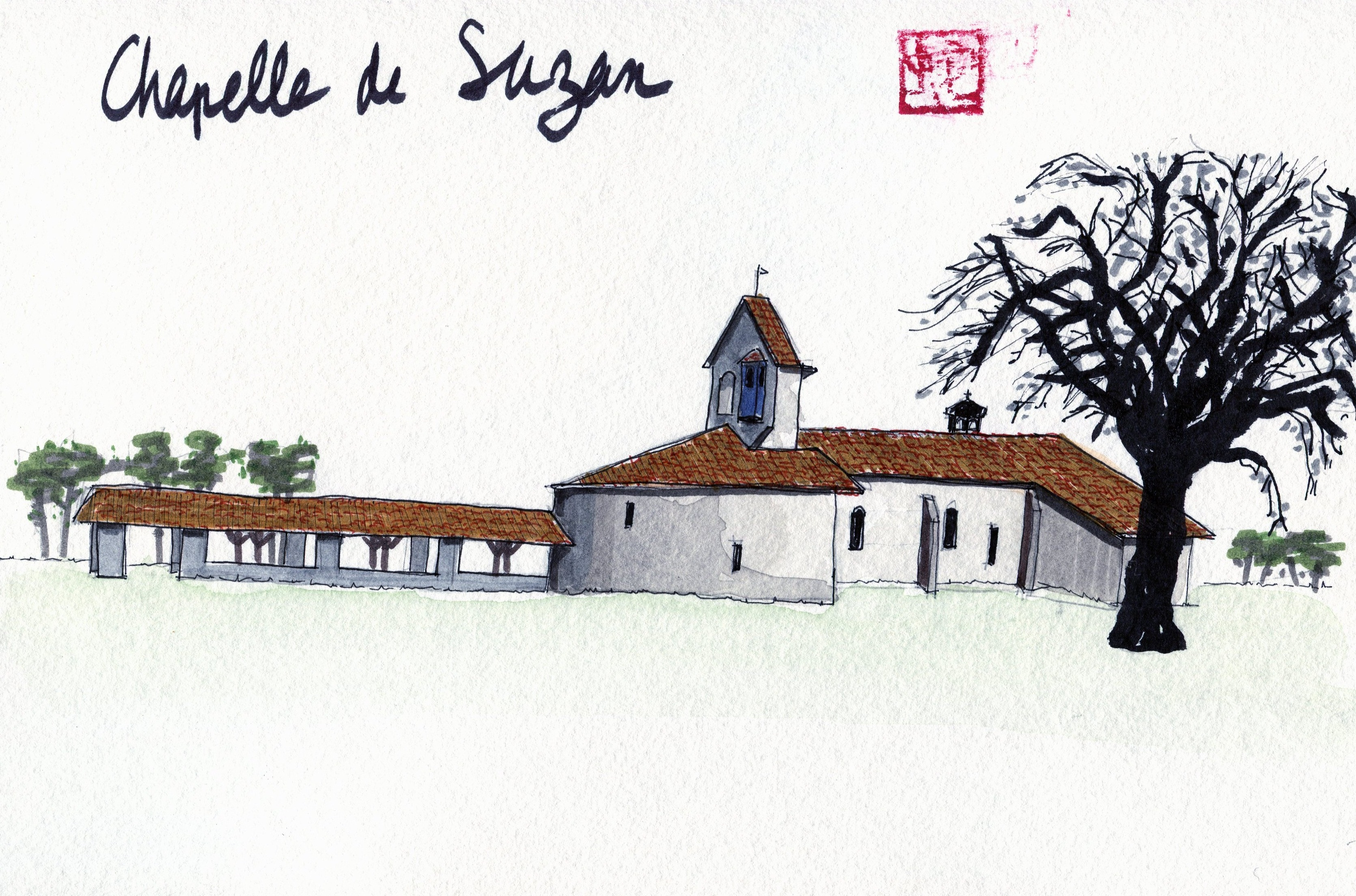 Aquarelle de la chapelle de Suzan à Ousse-Suzan dans le département français des Landes.